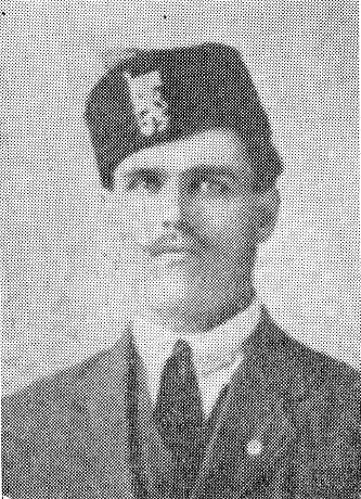 Дине Гогов